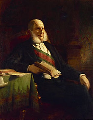 Der Dargestellte sitzt nach links gewandt, mit stoischem, nachdenklichen Ausdruck. Er trägt einen Frack, unter dem die rot-grüne Schärpe des St. Stephans-Ordens deutlich zu erkennen ist - dieser Orden war die höchste Auszeichnung der Monarchie. Ritter von Schmerling stützt seinen rechten Arm auf einen Schreibtisch, auf dem Bücher und Schriftstücke ausgebreitet sind. Er hält eines der Bücher aufgeschlagen in der Hand.